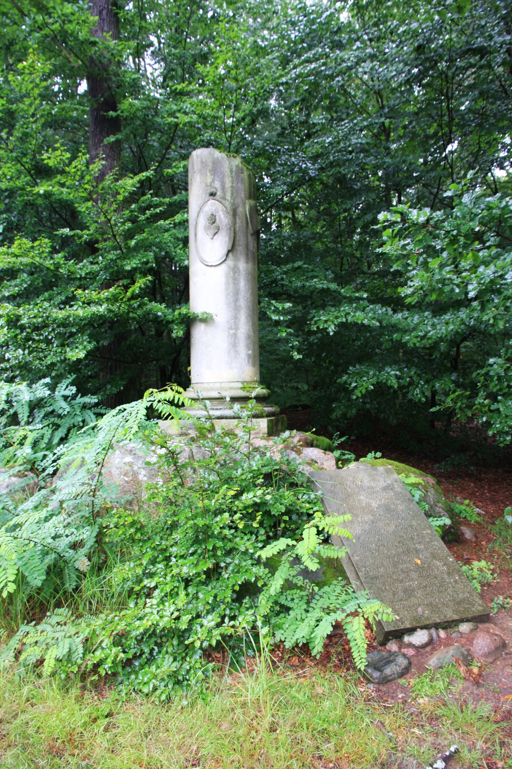 Malherbes-Denkmal im Schlosspark Rheinsberg